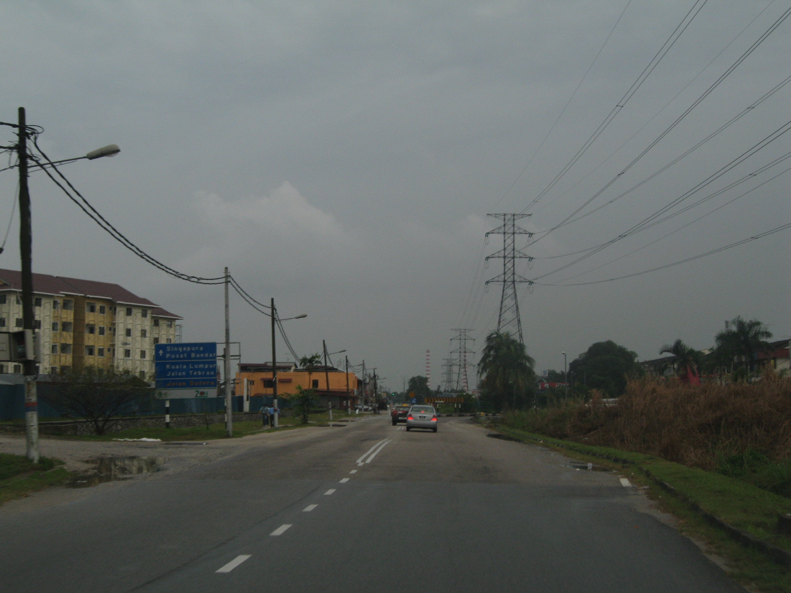 Jalan Pasir Pelangi, Johor Bahru, Johor, Malaysia.